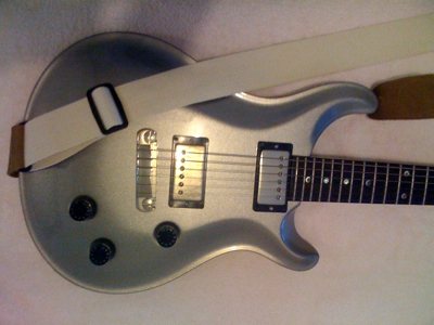 PRS Standard 22 Platinum Guitar